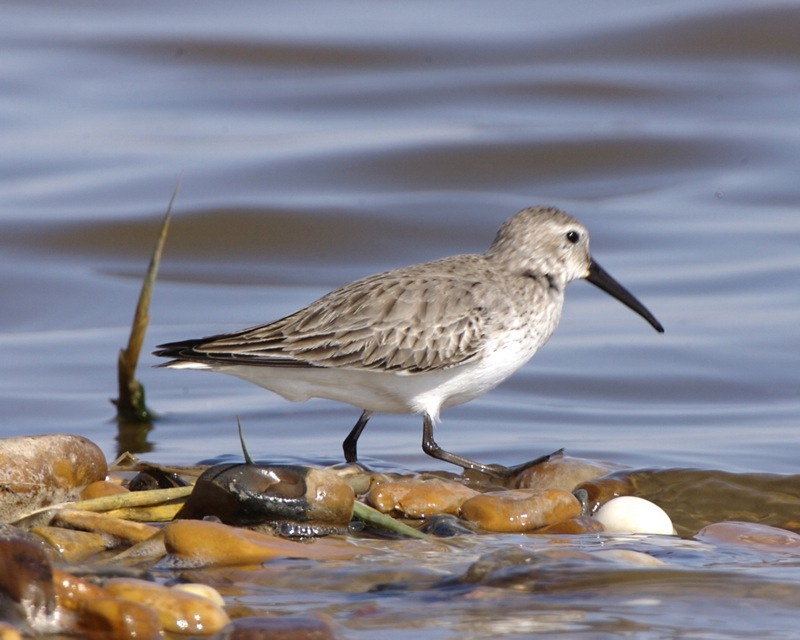 Dunlin Calidris alpina, El Fayoum, Egypt